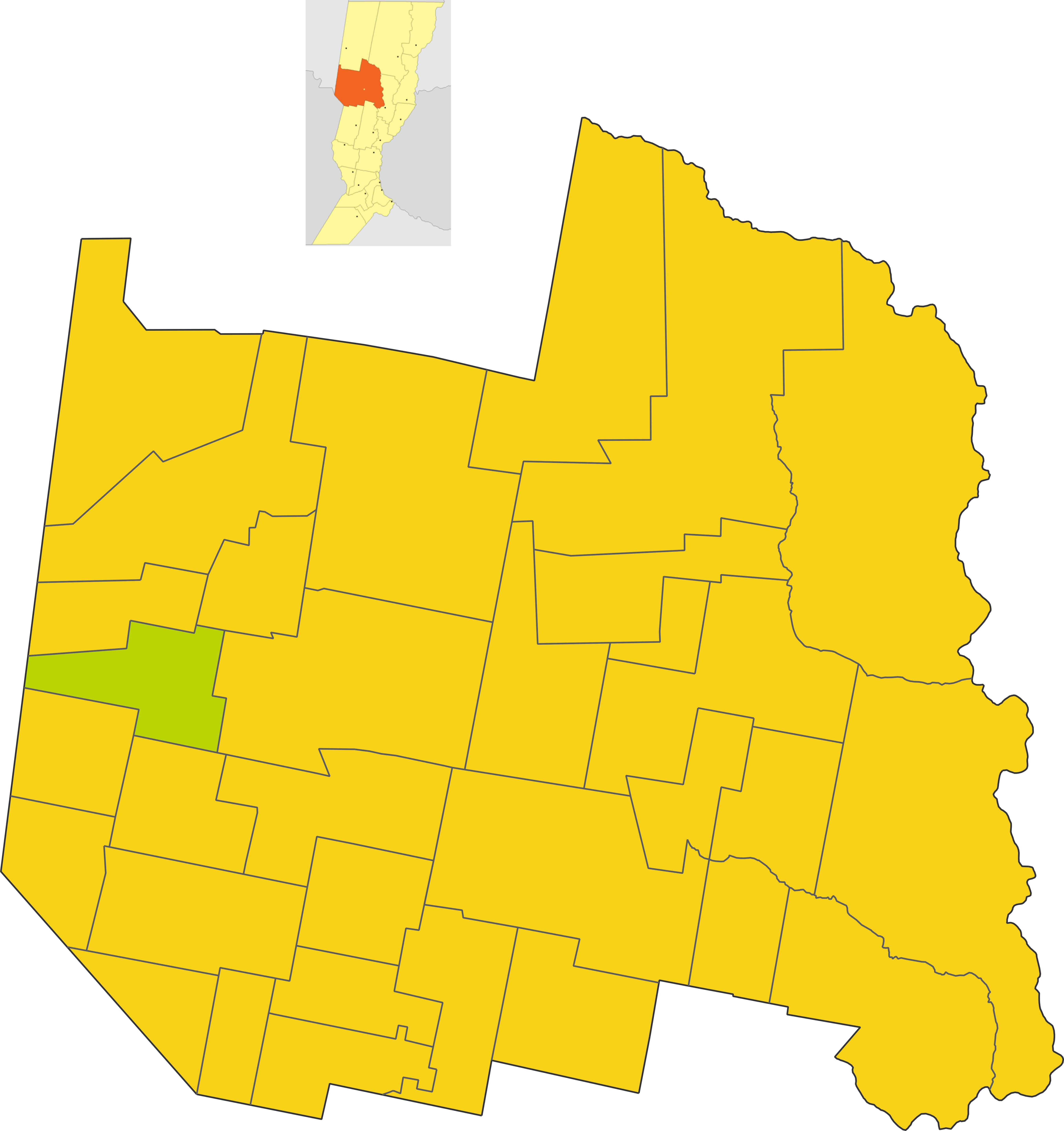 Map of the comuna de Villa Trinidad in San cristobal department, Santa fe province, Argentina